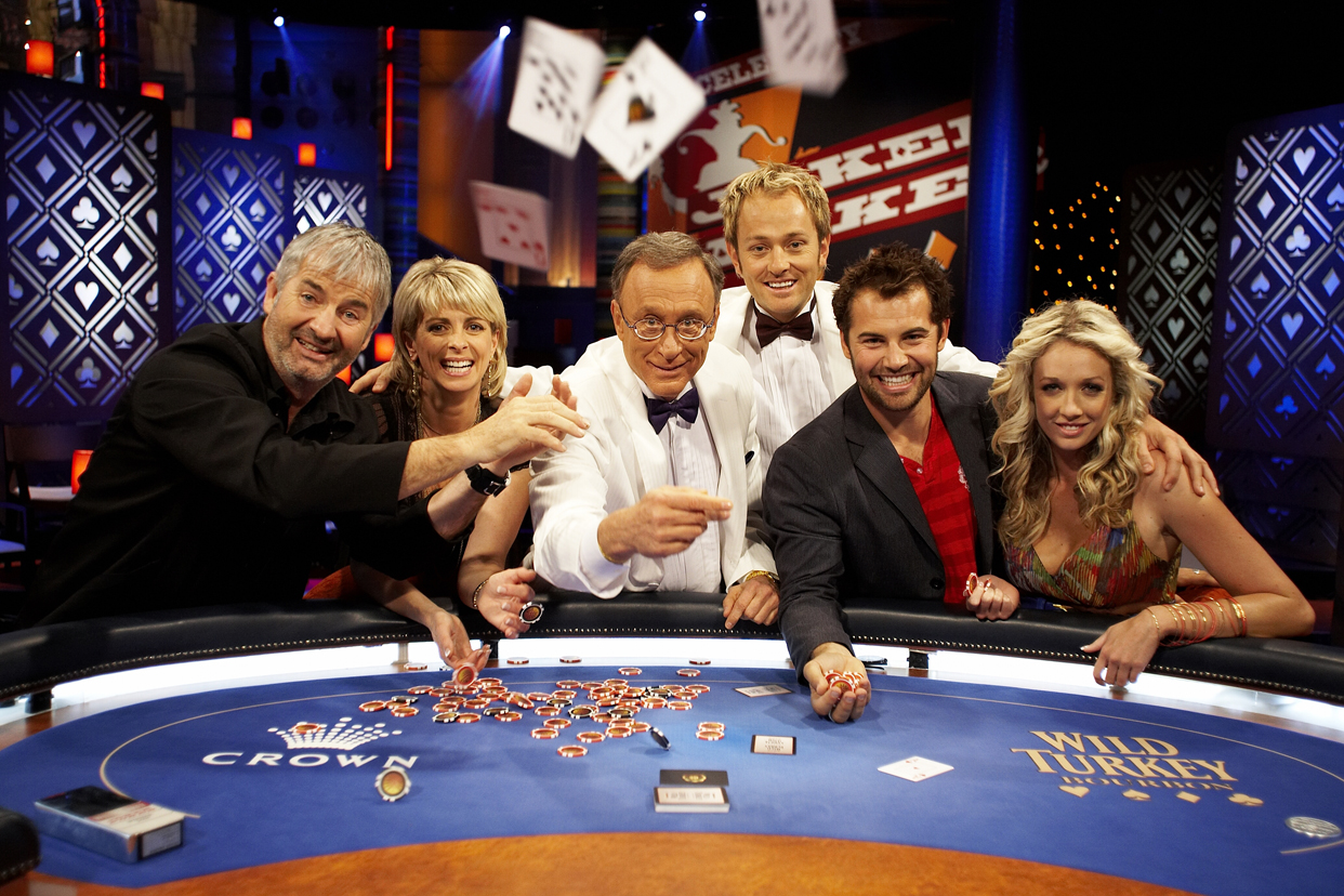 John Jarratt, Brigitte Duclos, Lee Nelson, Mike Goldman, Daniel McPherson,Bree Amer